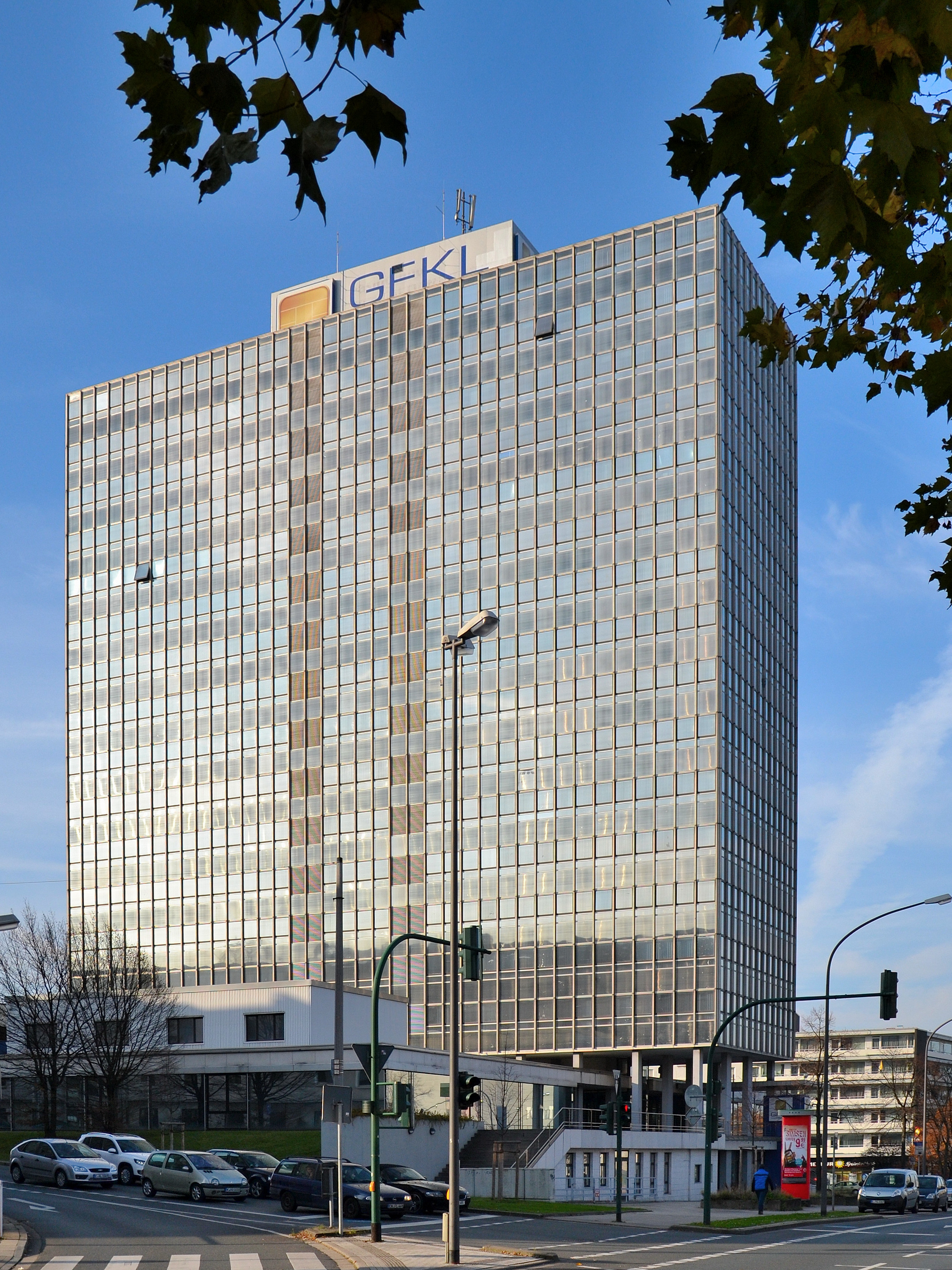 GFKL-Haus in Essen, vormals Iduna-Hochhaus, seit 2016 City Tower Essen